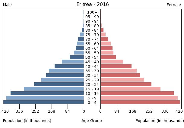 Demografie Eritreas